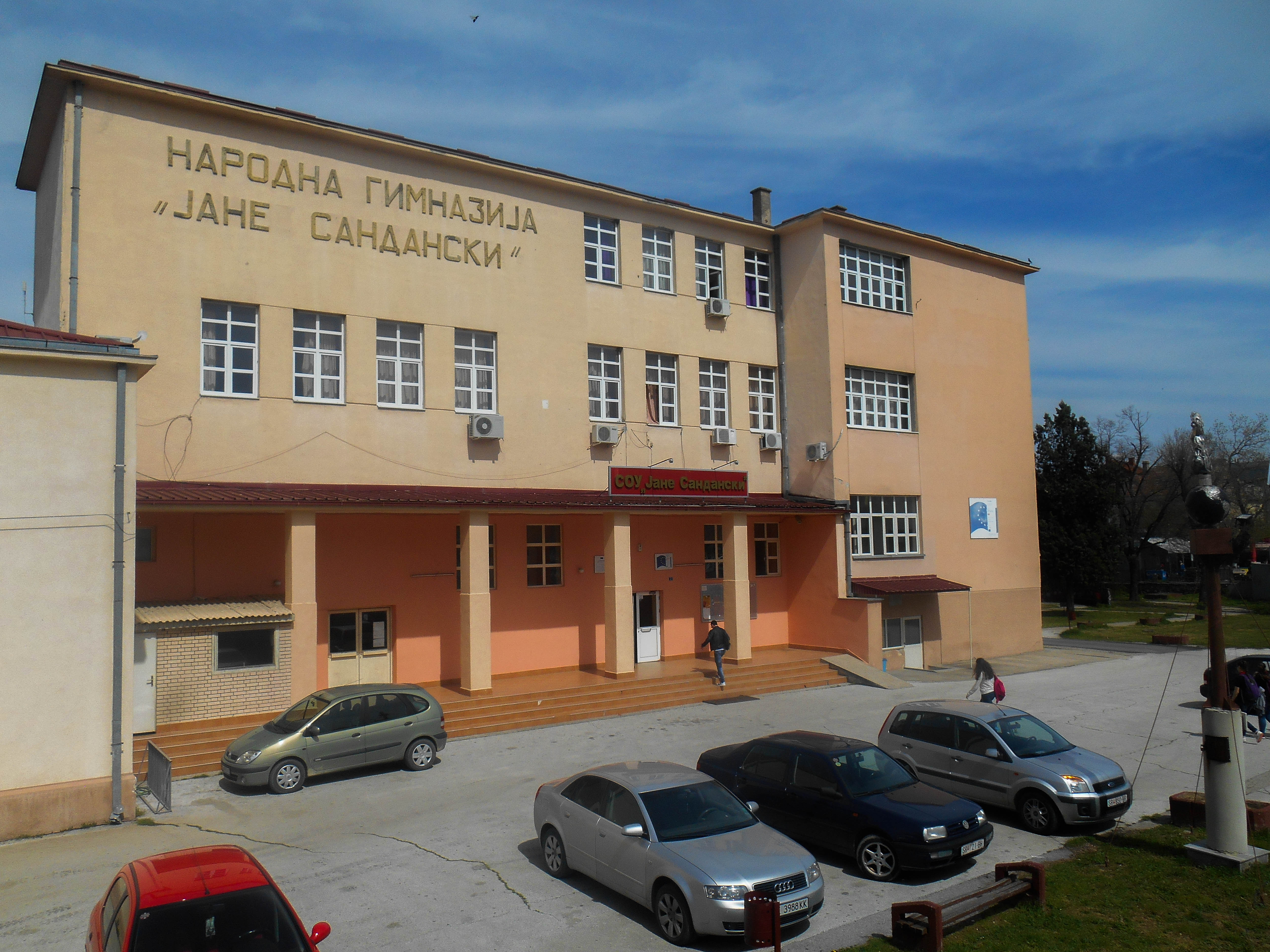 Училиште Јане Сандански